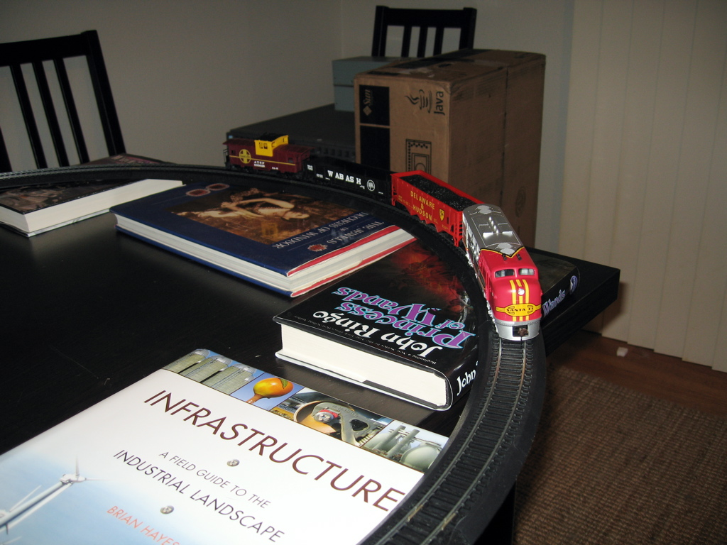 Bachmann Santa Fe Flyer Model Train Set